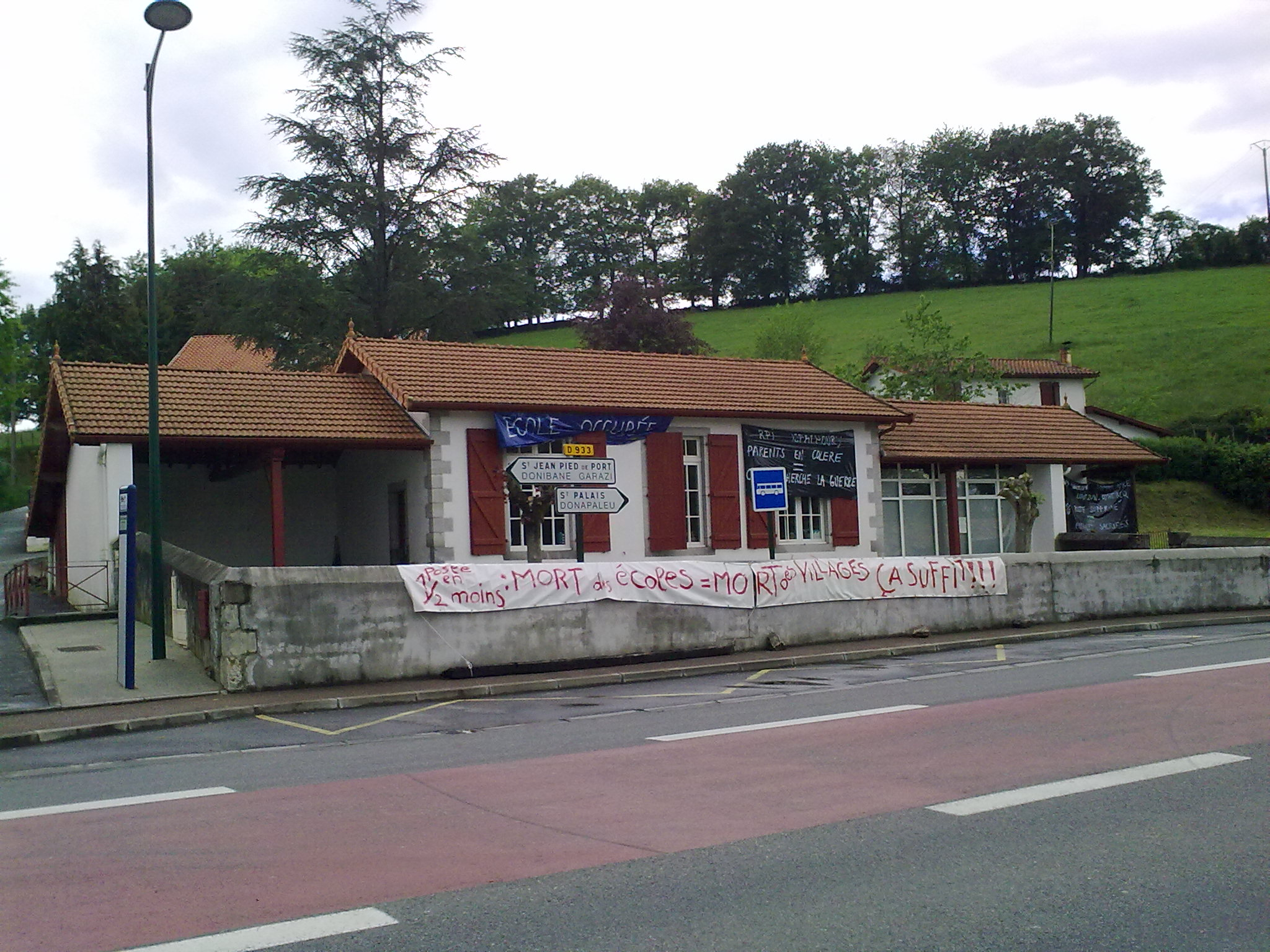 Uhart-Mixe, France